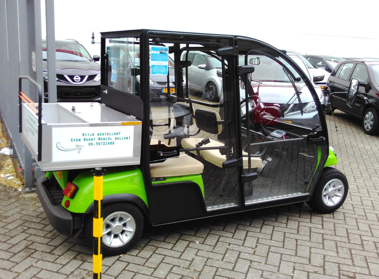 Buurtmobiel in Utrecht, Nederland. mei 2017